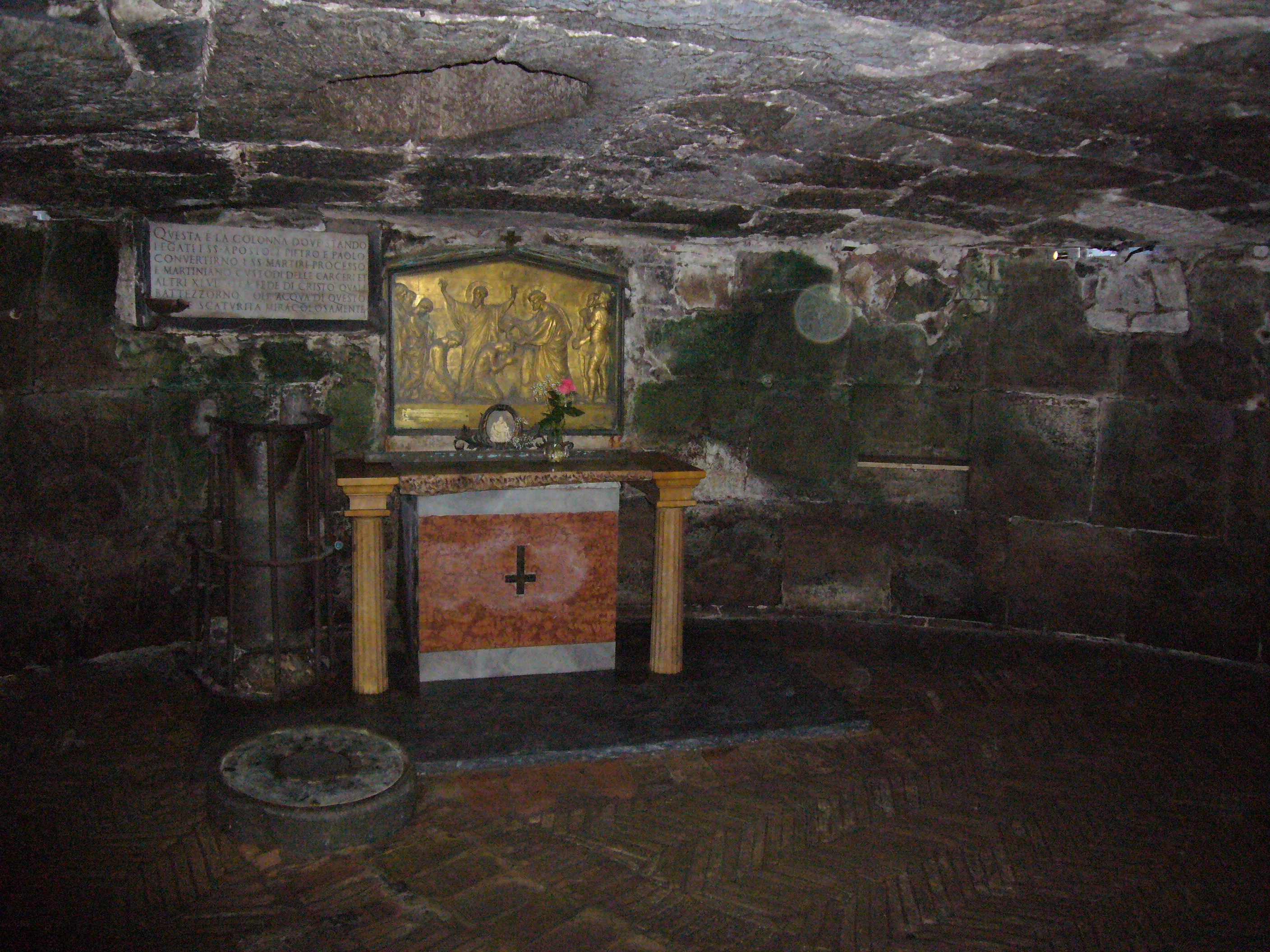 Roma, Mamertinum: il Tullianum, con pozzo, altare e colonna